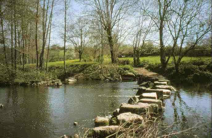 Gué sur le Thouet (2)